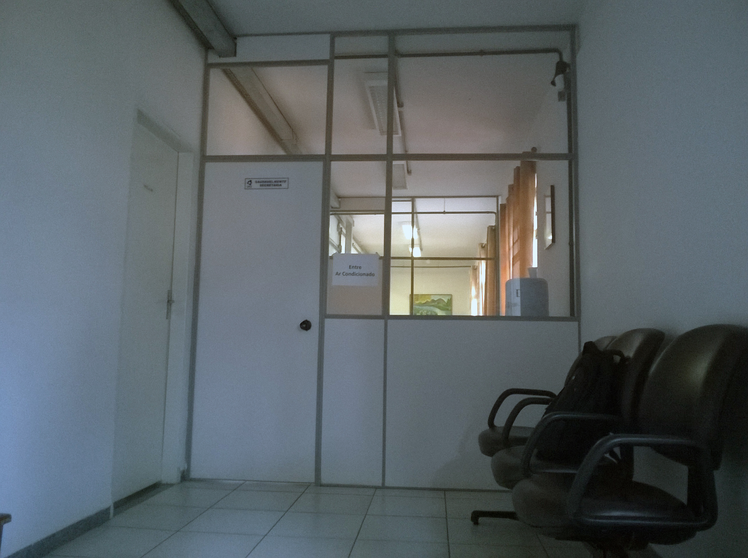 Recepção do Saudavelmente, UFG Colemar Natal e Silva, agosto de 2016.